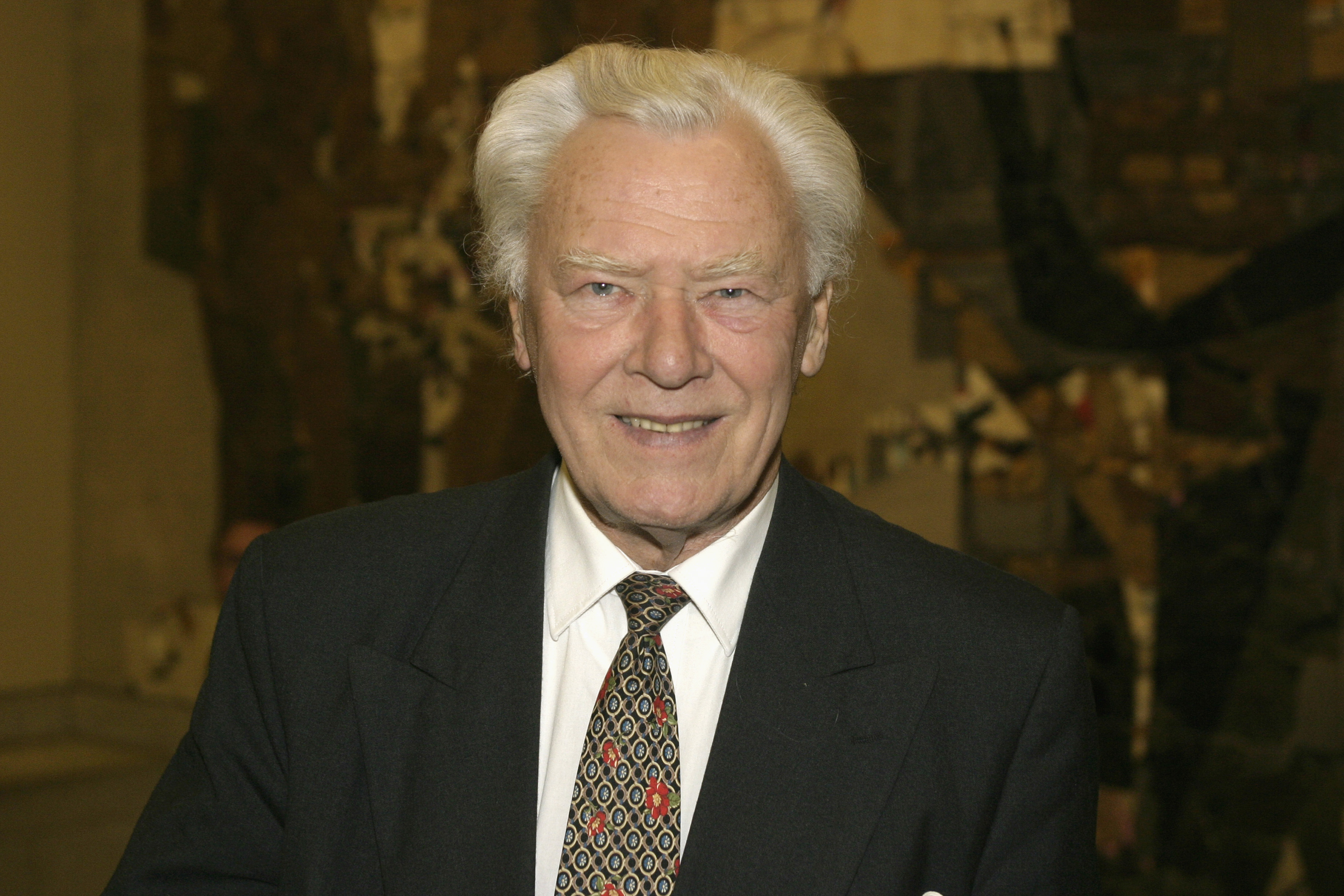 Danmarks f.d. statsminister Poul Schlüter (Bilden är tagen vid Nordiska rådets session i Oslo, 2003)